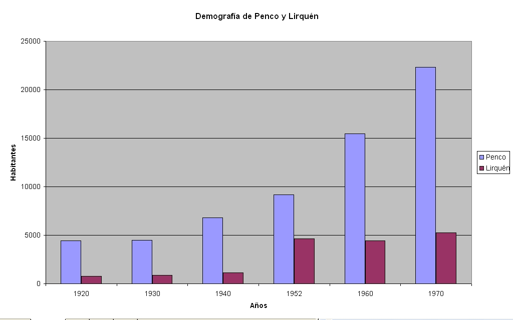 Demografia Penco